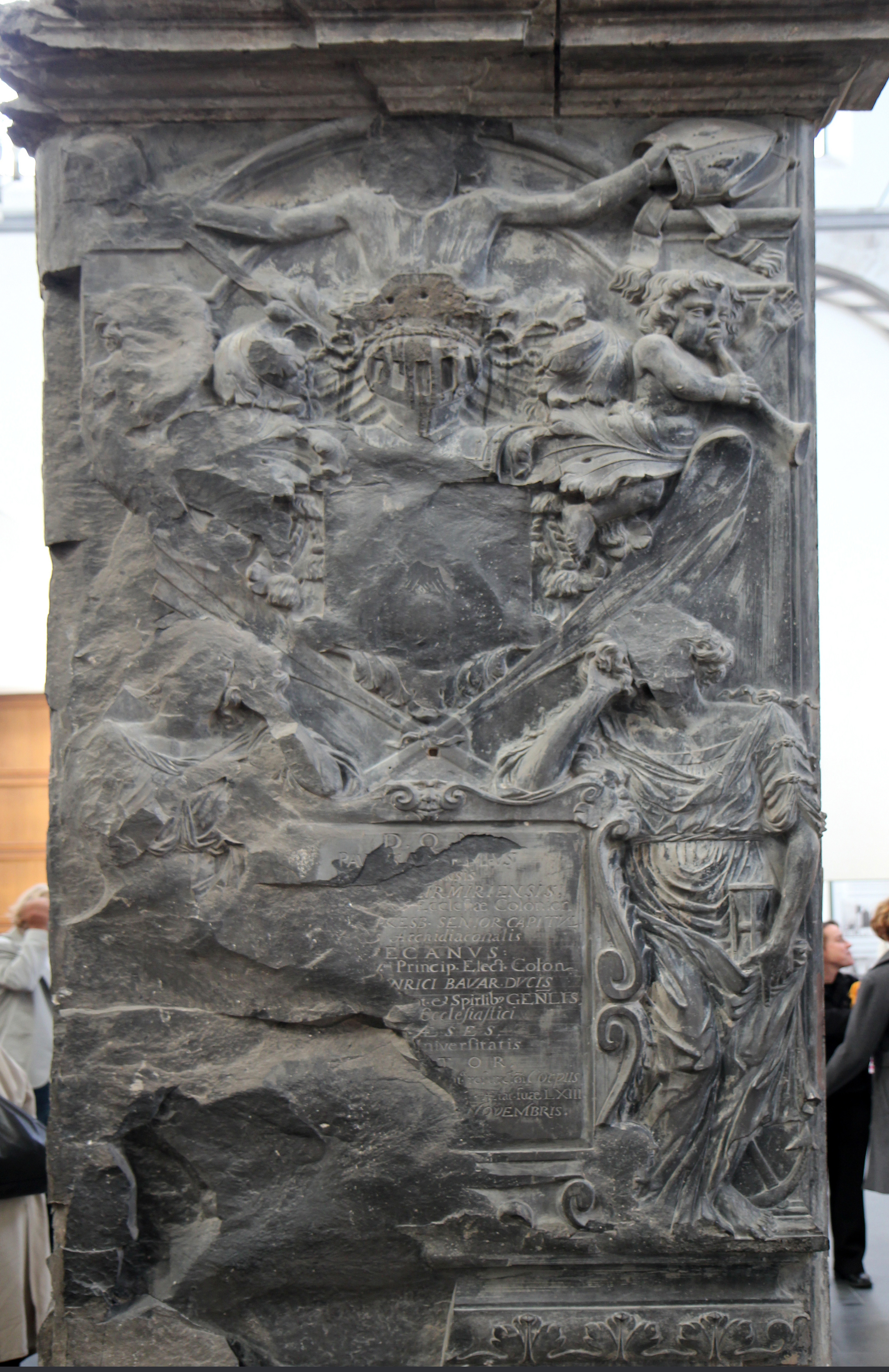 Köln Altstadt-Nord, St. Kunibert. Epitaph des Kanonokers Paul von Aussem